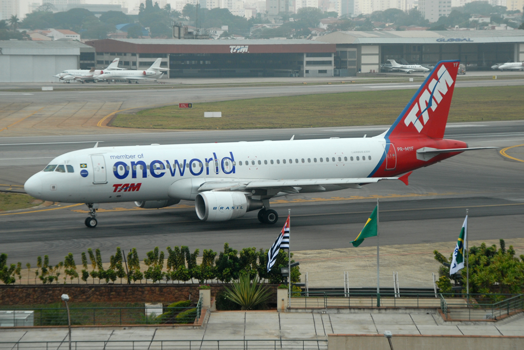 PR-MYF@CGH 16AUG14